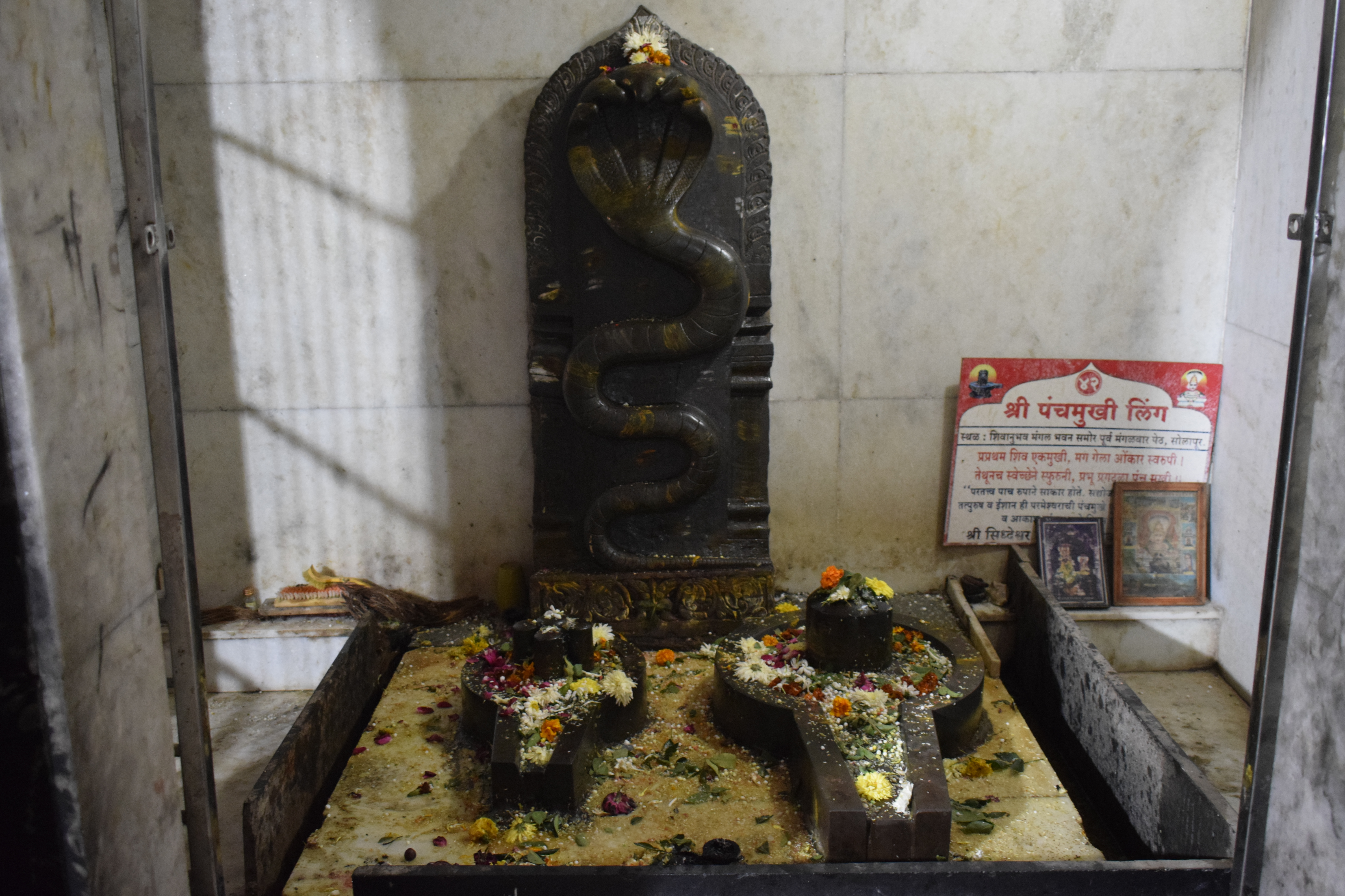 श्री पंचमुखी लिंग